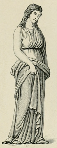 Fig. 73. Germanin, um 150 n. Chr.